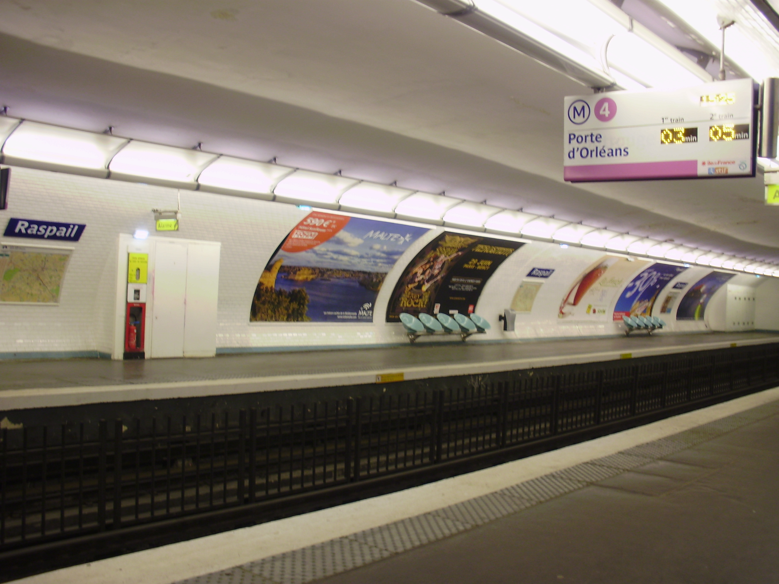 Quais de la ligne 4 de la station Raspail du métro de Paris